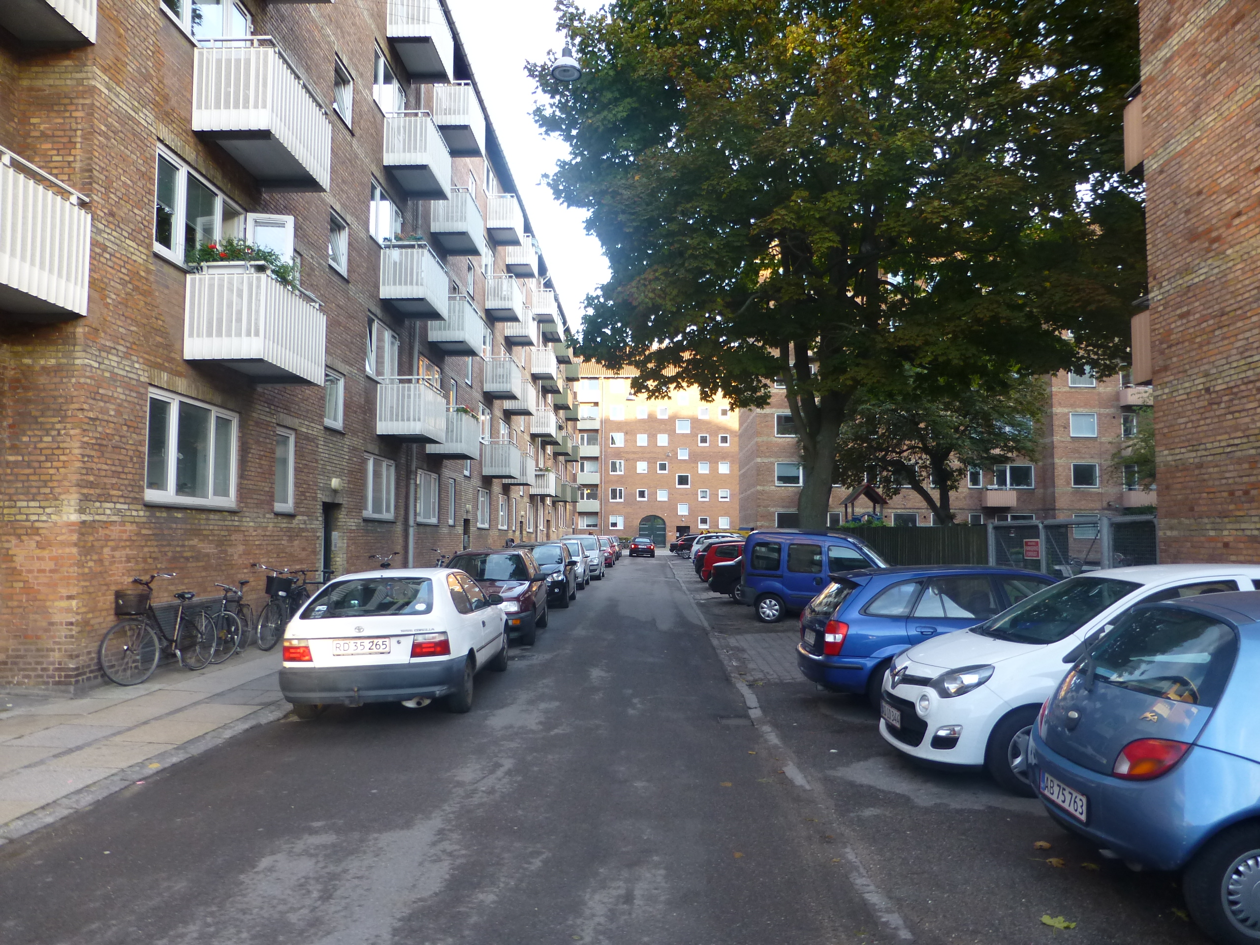 The street Overskæringen in Nørrebro in Copenhagen.